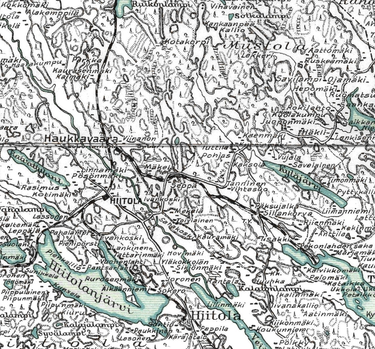 Узкоколейная железная дорога Хауккаваара — Пеконлахти на карте 1924 года.